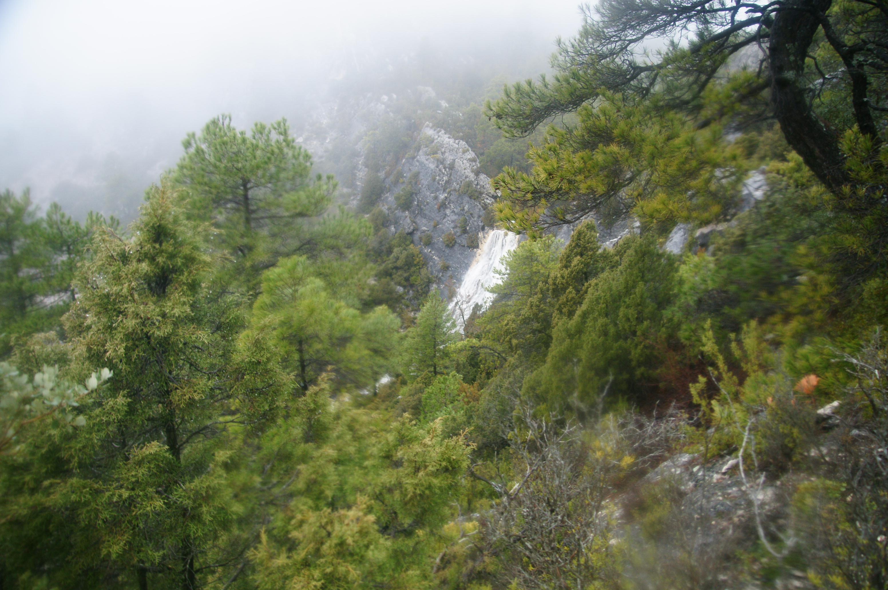 Cascada Natural Peña del Cagurrial - El Chorrillo - Fresneda de la Sierra - Cuenca - Spain